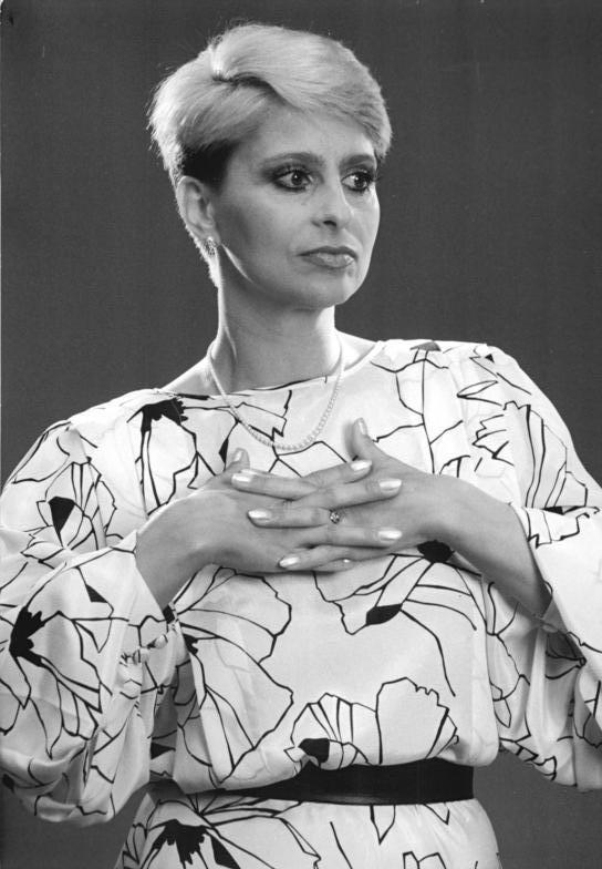 Dagmar Frederic ADN-ZB Schöps-19.7.85-br Frederic, Dagmar [Porträt Dagmar Frederic] Abgebildete Personen: Frederic, Dagmar: Schlagersängerin, DDR